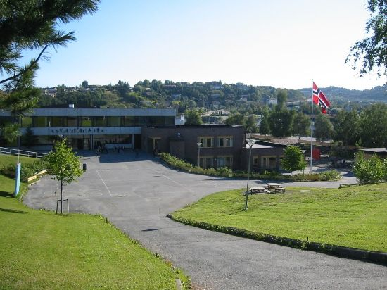 Bilde av Nardo skole, Trondheim.